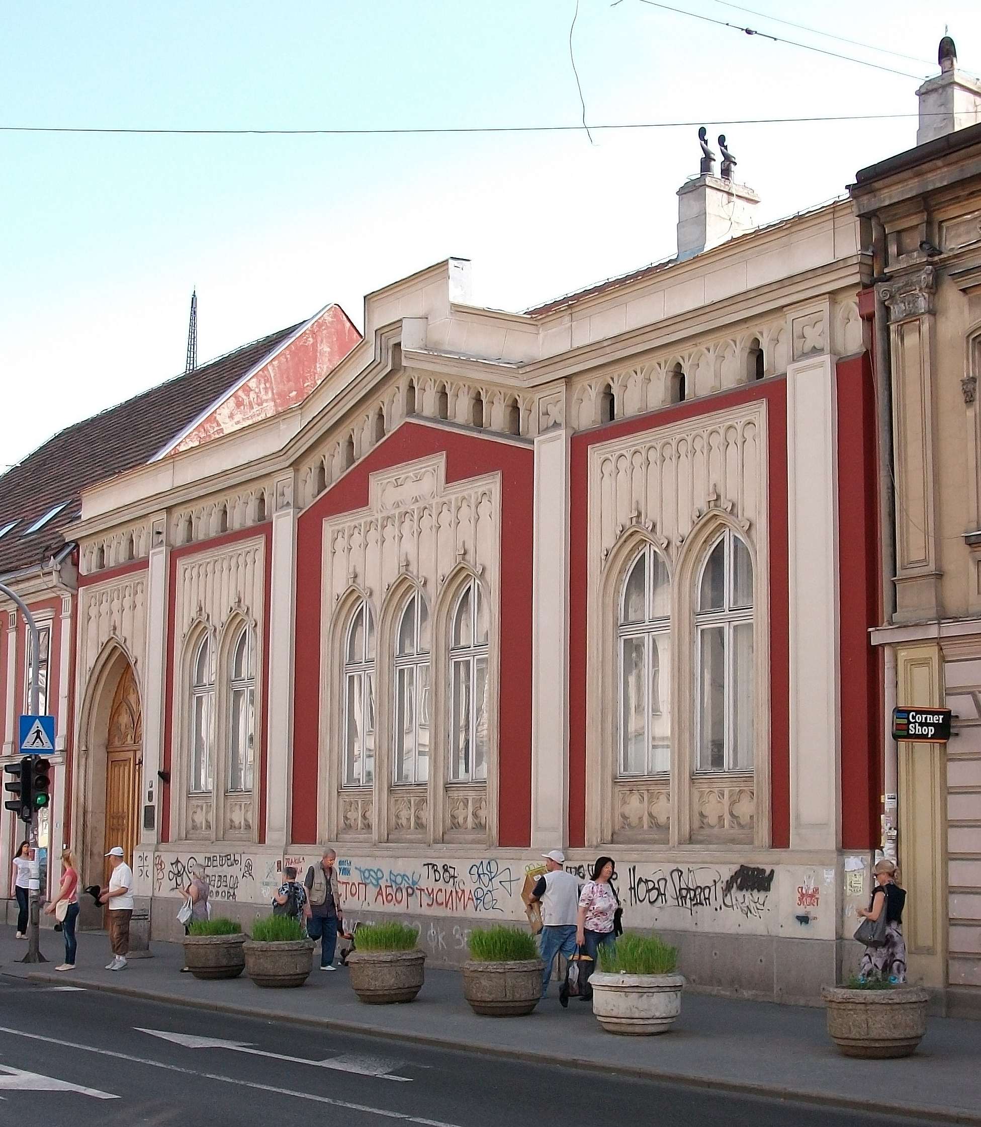 denkmalgeschütztes Museum Zemun in Belgrad-Zemun (Serbien)